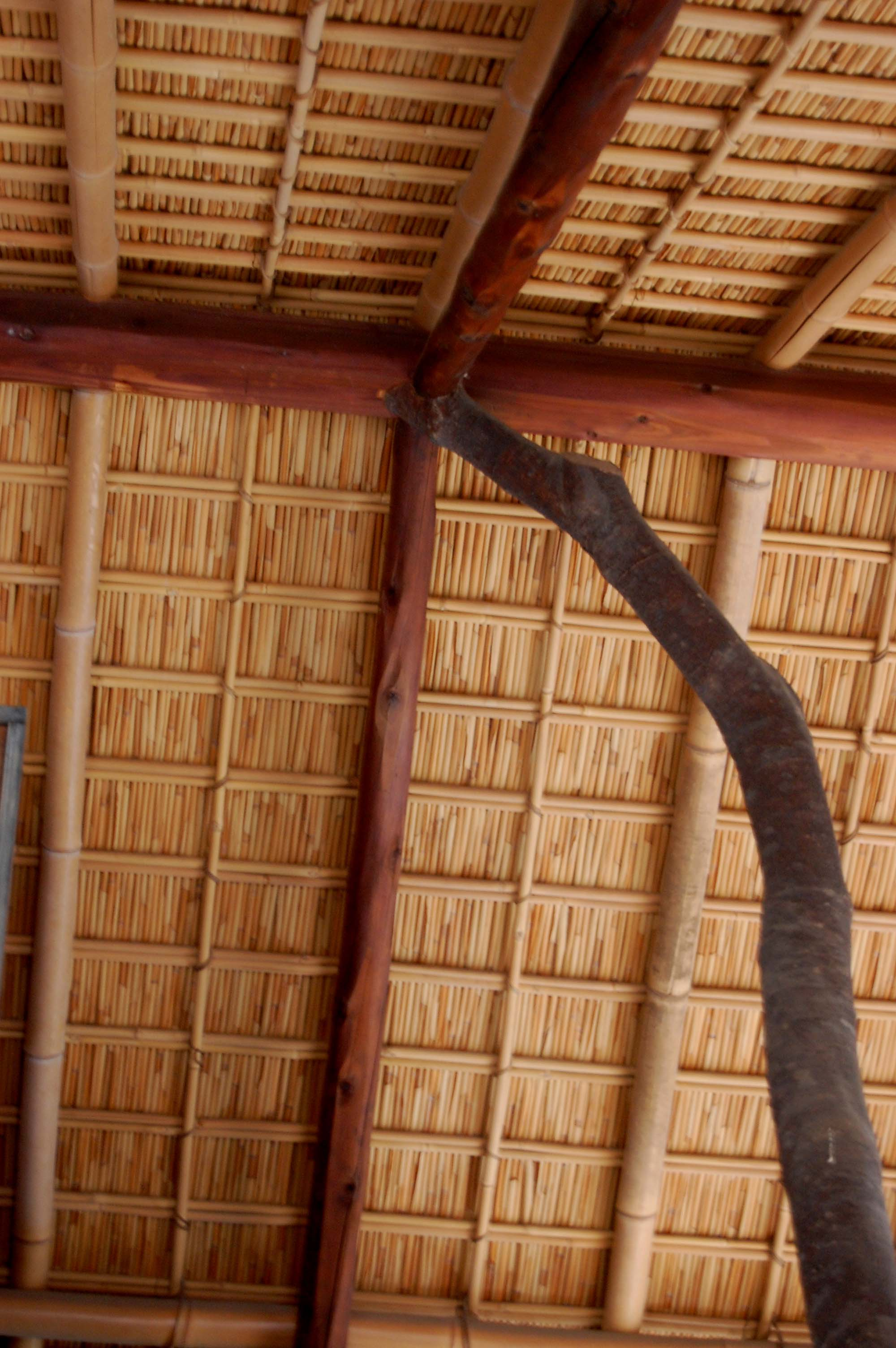 poteau Geppa-ro pavillion